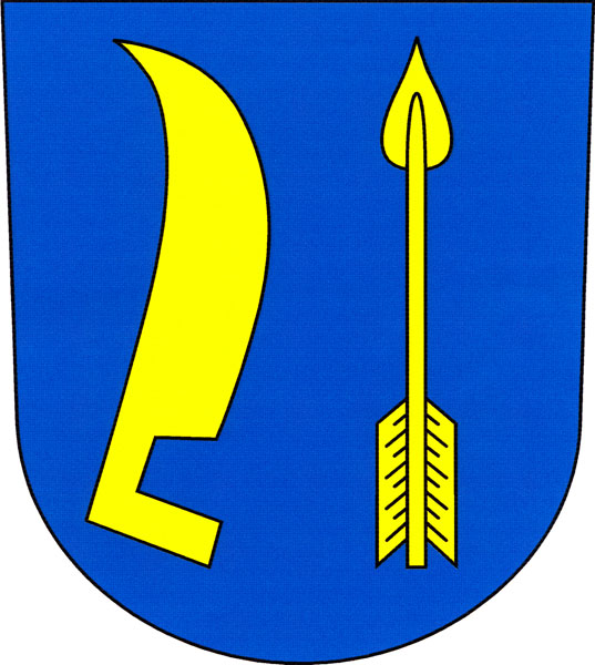 Znak obce Střelice v okrese Brno-venkov